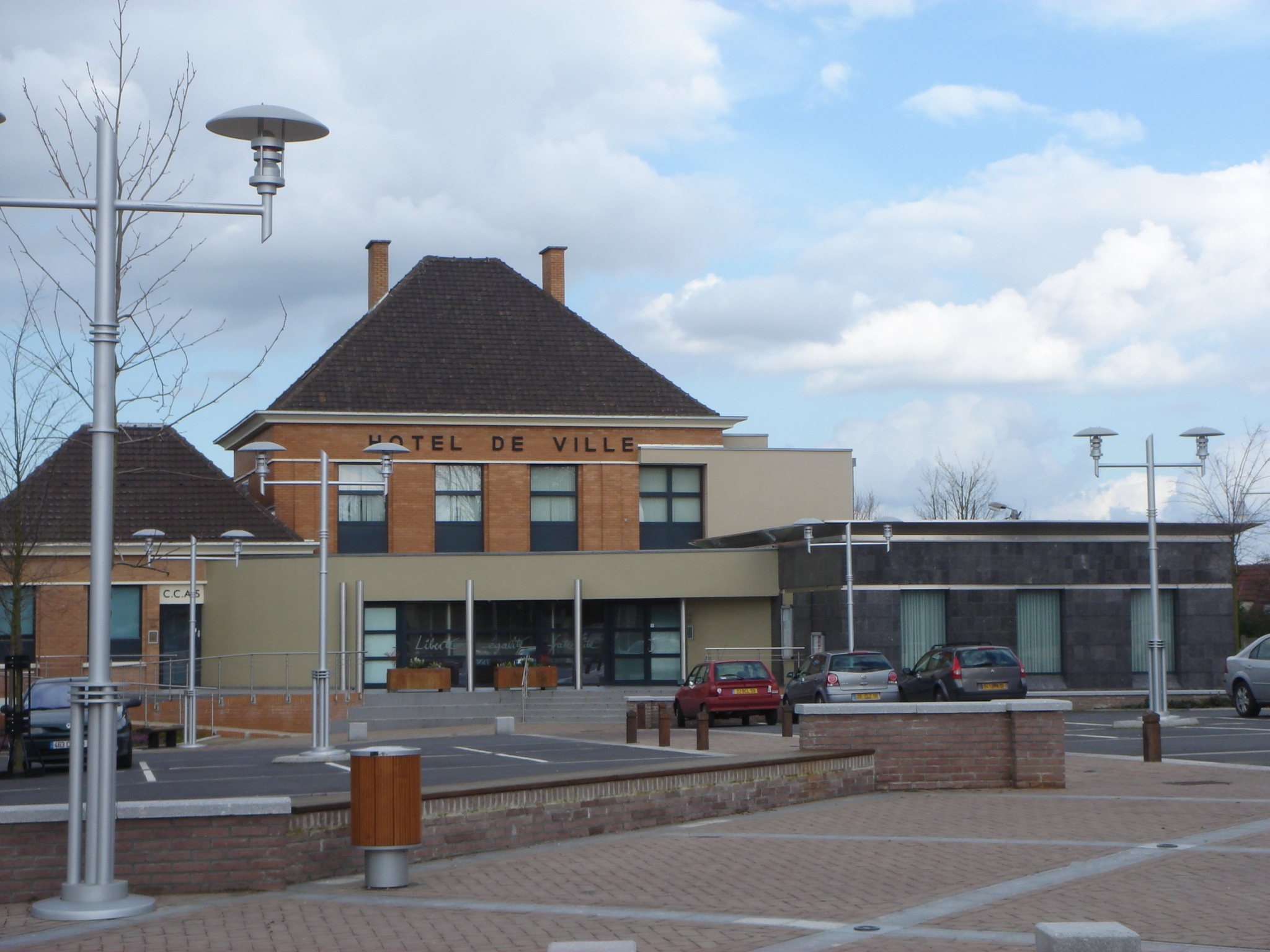 Hôtel de ville Montigny-en-Ostrevent.